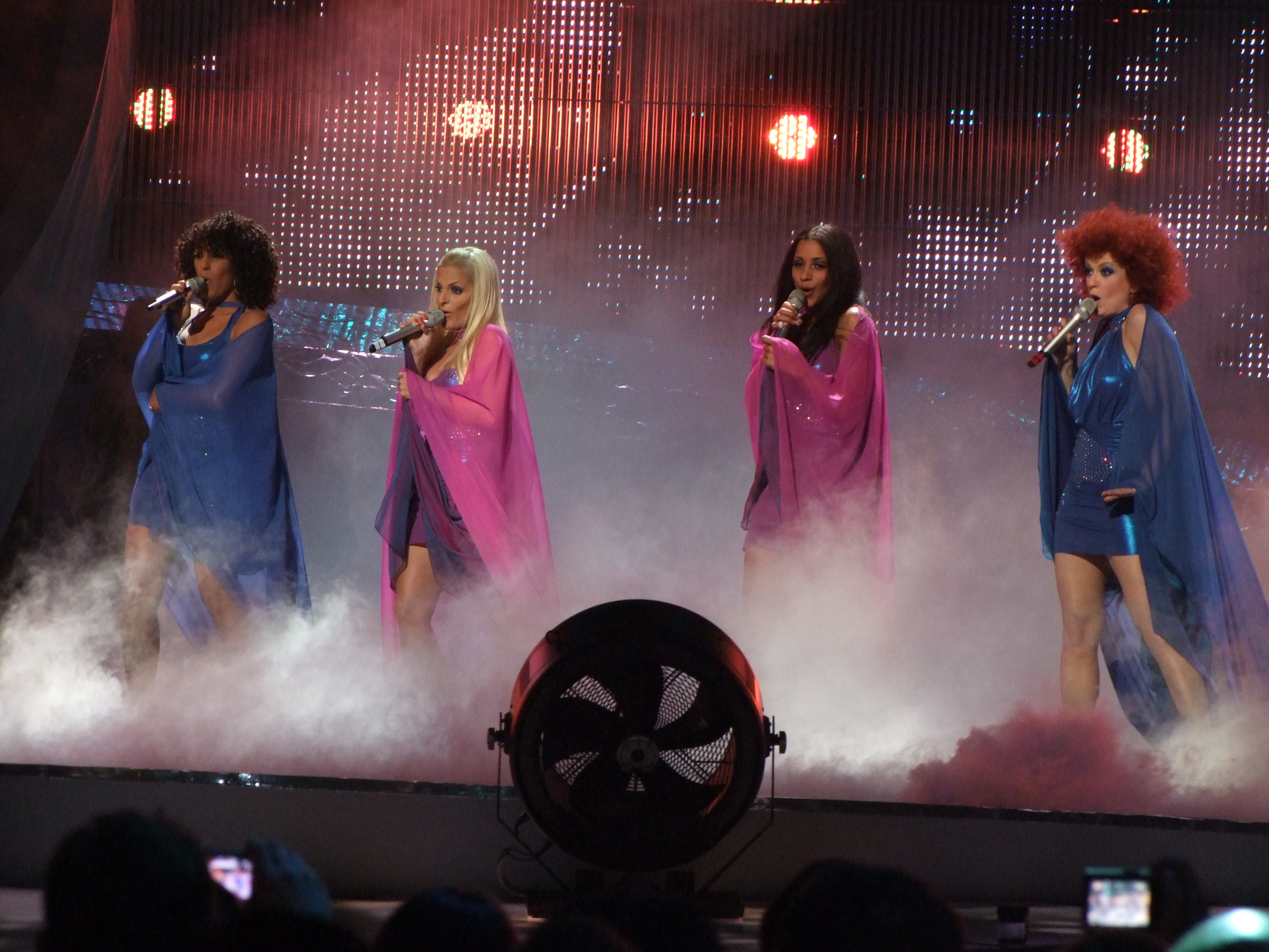 Final Eurovision 2008